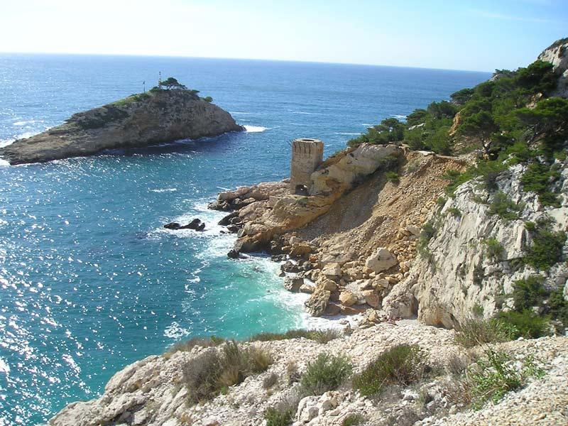 La calanque de l'Érevine (Ensuès-la-Redonne, France)